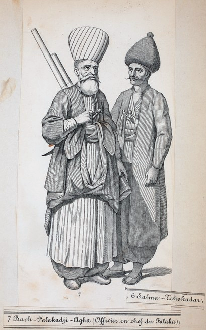 Фалакаджи